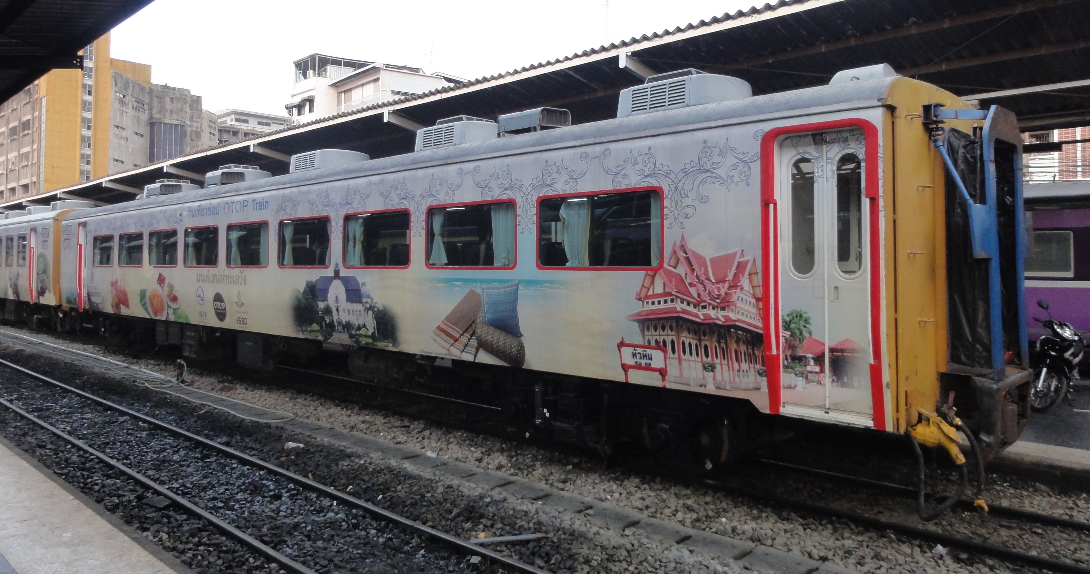 タイ国鉄に譲渡された国鉄14系客車